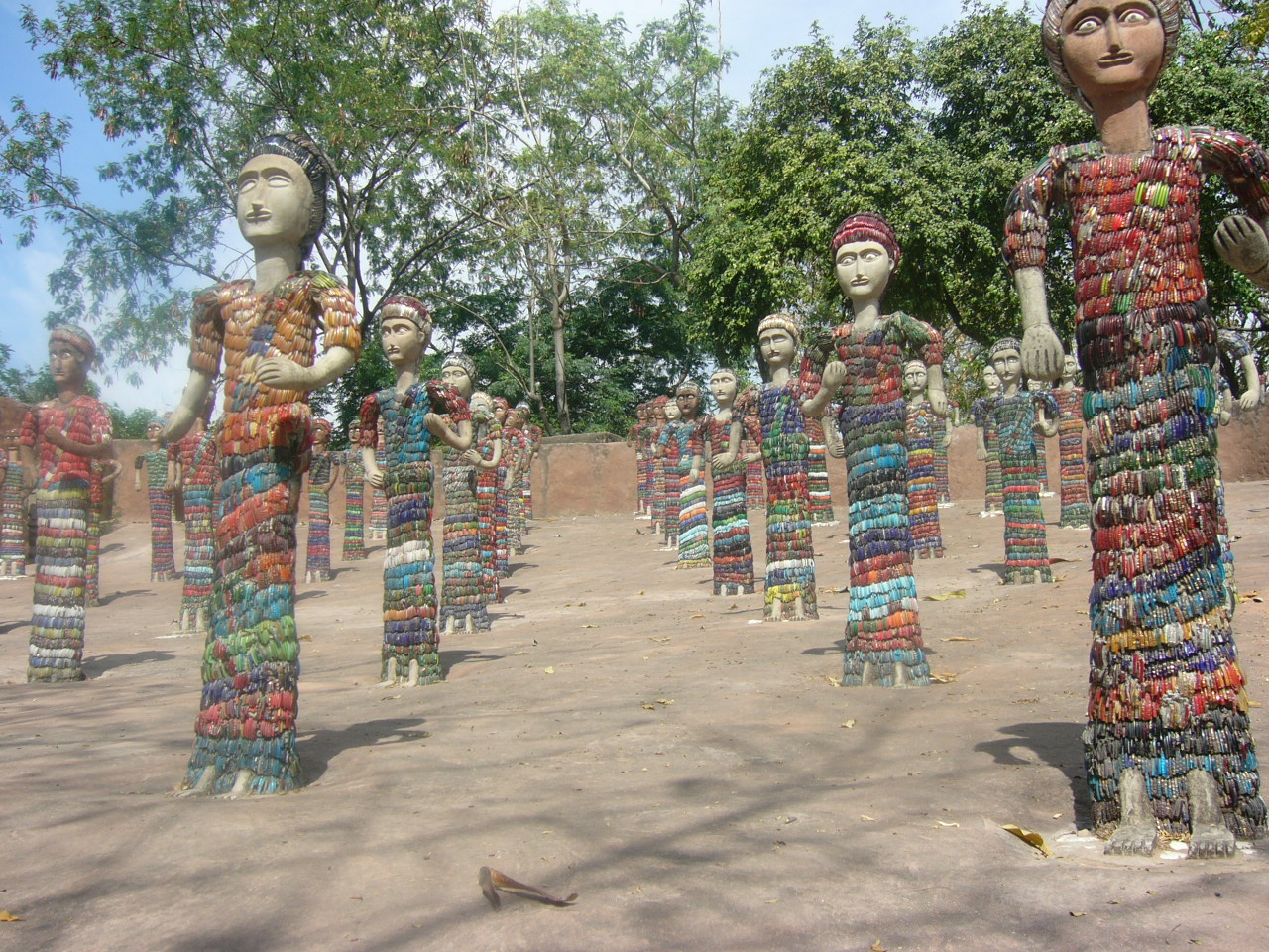 Rock Garden Chandigarh India